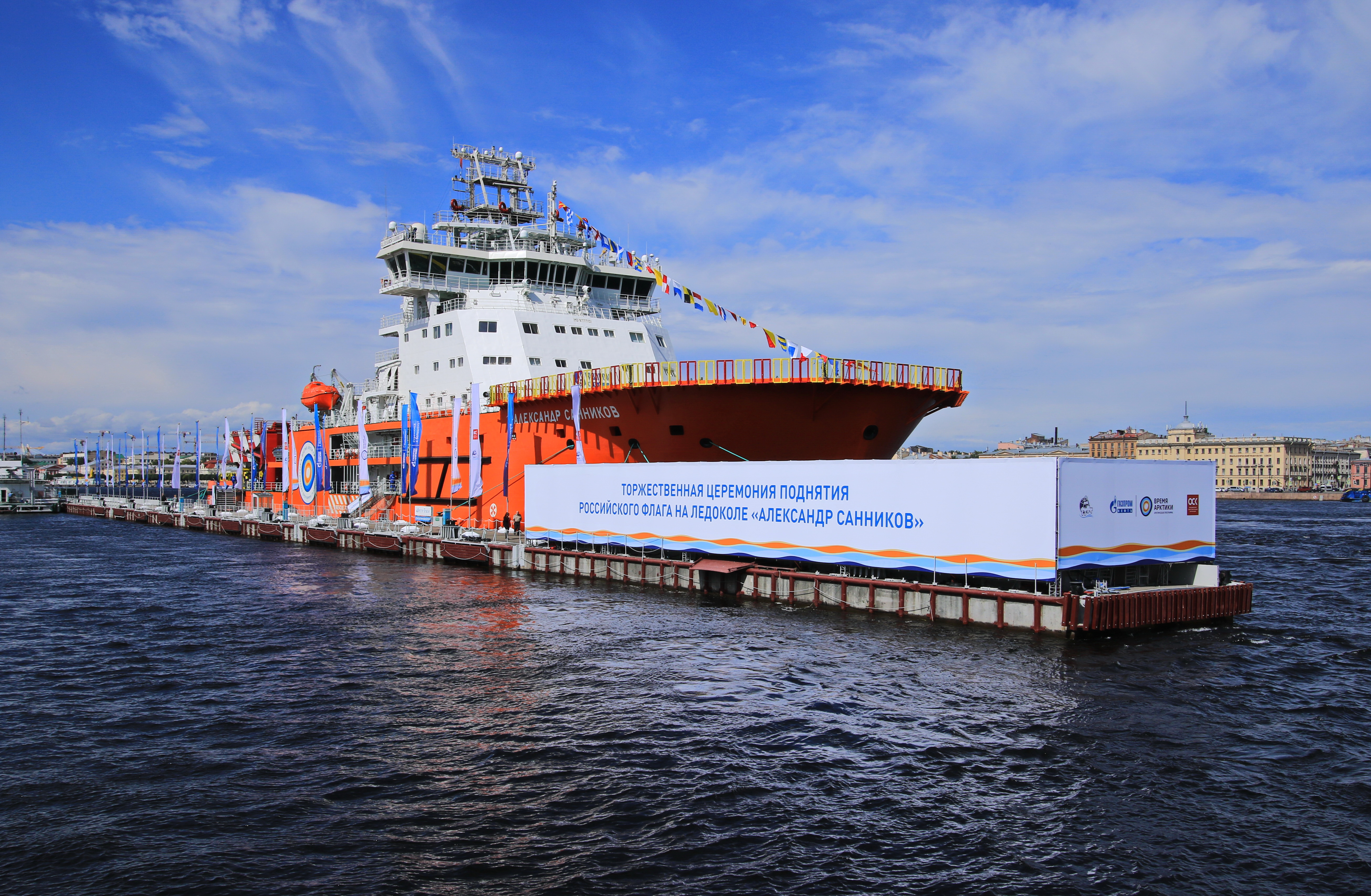 Diesel-Eisbrecher "Alexander Sannikov"in St. Petersburg auf der Neva.